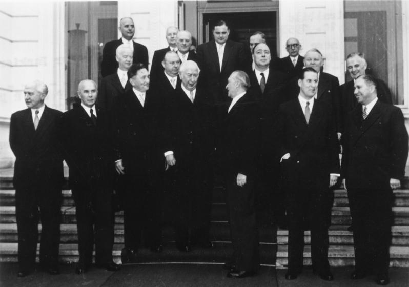 Zentralbild/ 22.10.1953 Das neue Adenauerkabinett - ein Kabinett der Bankier und Kanonenkönige Unter direkter Anleitung des Nazi-Bankiers Pferdmenges stellte Adenauer sein neues Kabinett zusammen. UBz: (1.Reihe); Schäfer (FDP), Kaiser (CDU), Storch (CDU), Bundespräsident Heuss, Adenauer, Schröder (CDU), Kraft (BHE) zweite Reihe: Lübke (CDU), Hellwege (DP), Preusker (FDP), Erhard (CDU), Tillmanns (CDU), dritte Reihe: Würmeling (CDU), Strauss (CDU), Oberländer (BHE) und Schäffer (CSU)